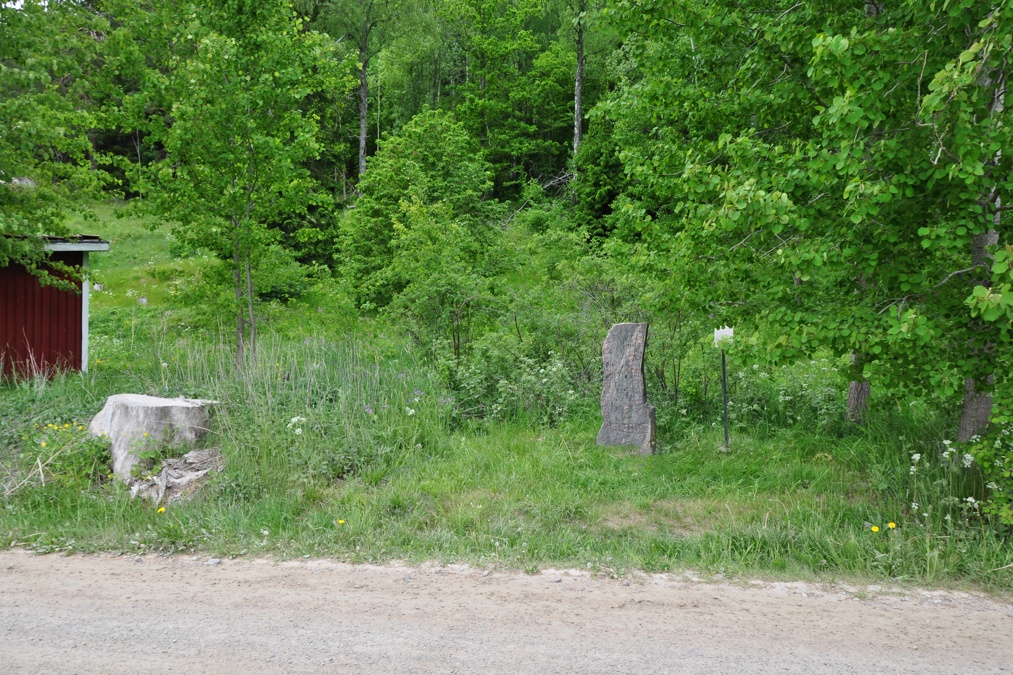 Nolingestenens (SöFV 1954;20 och i FMIS Grödinge 237:4) nuvarande placering invid en grusväg. Den plöjdes upp 1952 i en åker i närheten tillsammans med en bautasten vilka markerade läget för en bro över en å.